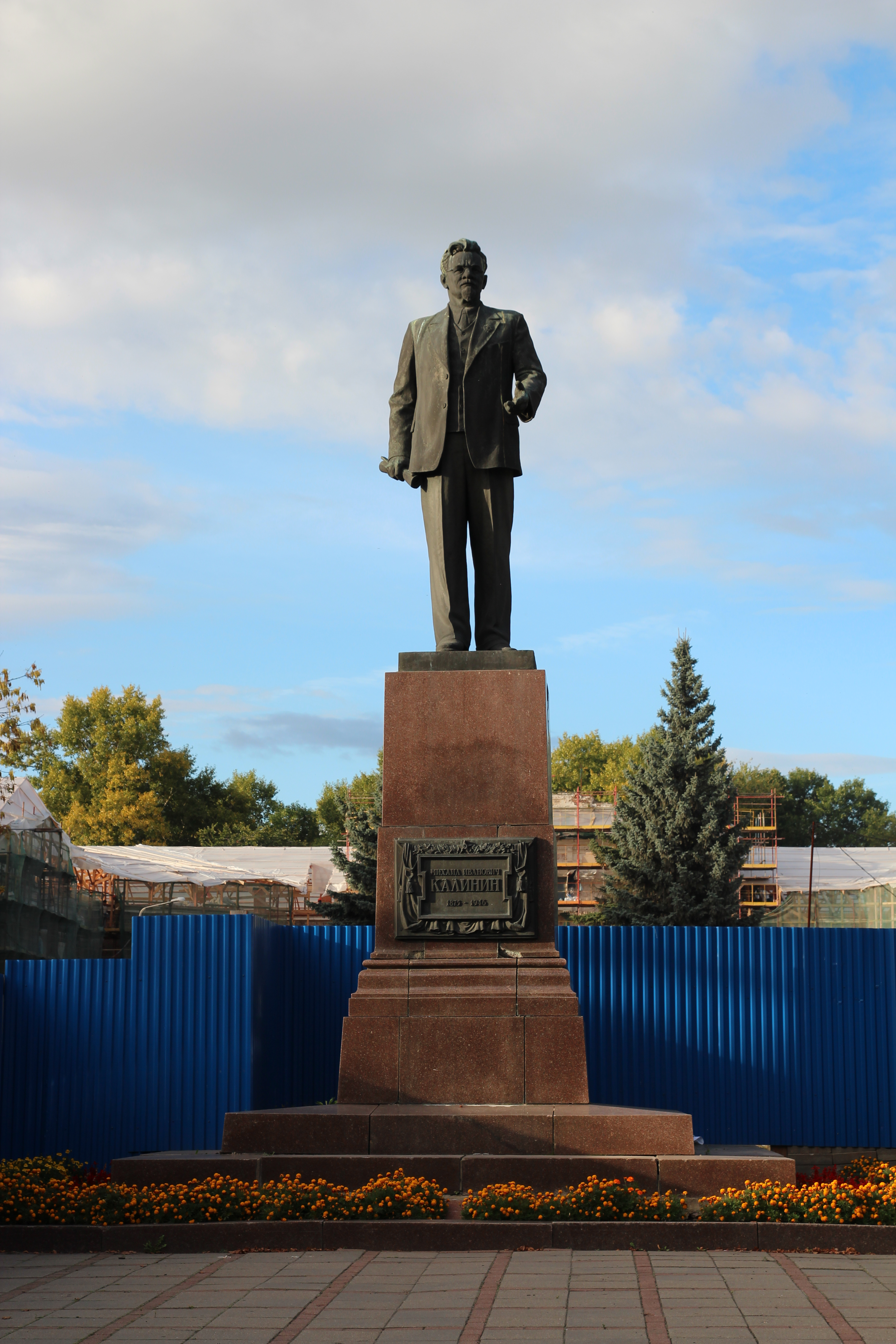 Памятник М.И. Калинину: площадь Революции, Тверь, Тверская область